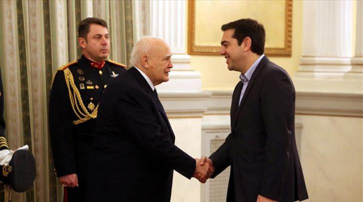 Πολιτική Ορκωμοσία Αλέξη Τσίπρα